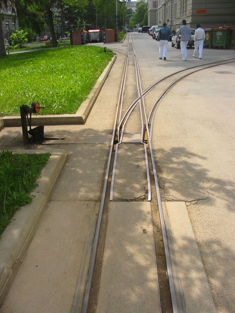 Narrow gauge railroad (Feldbahn) in Geriatriezentrum Lainz, Vienna, Austria